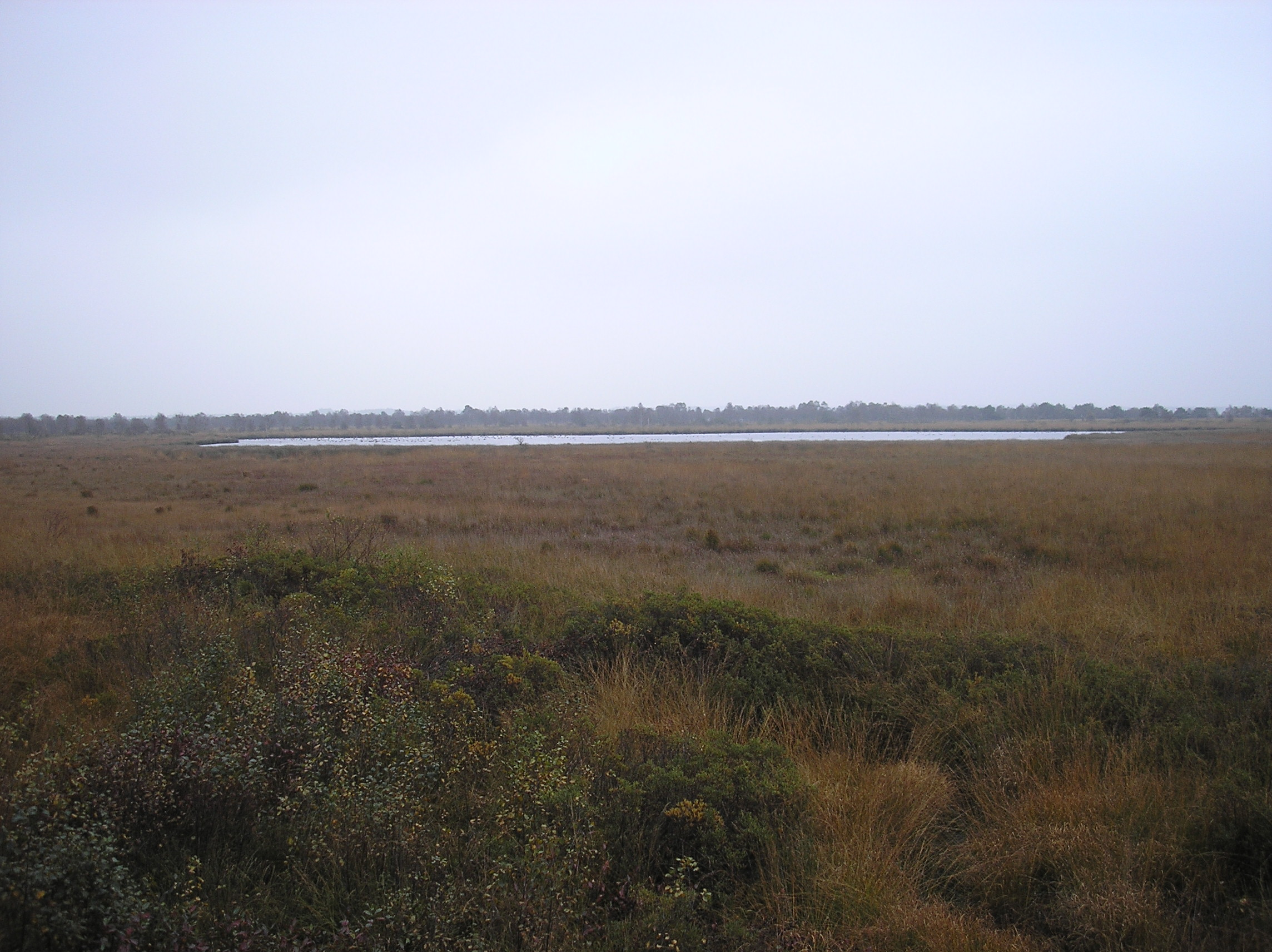 Blick über das intakte Huvenhoopsmoor mit dem Huvenhoopssee